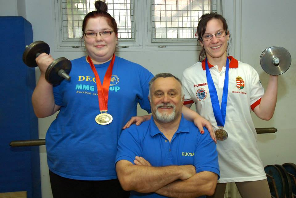 kovacskoteles01